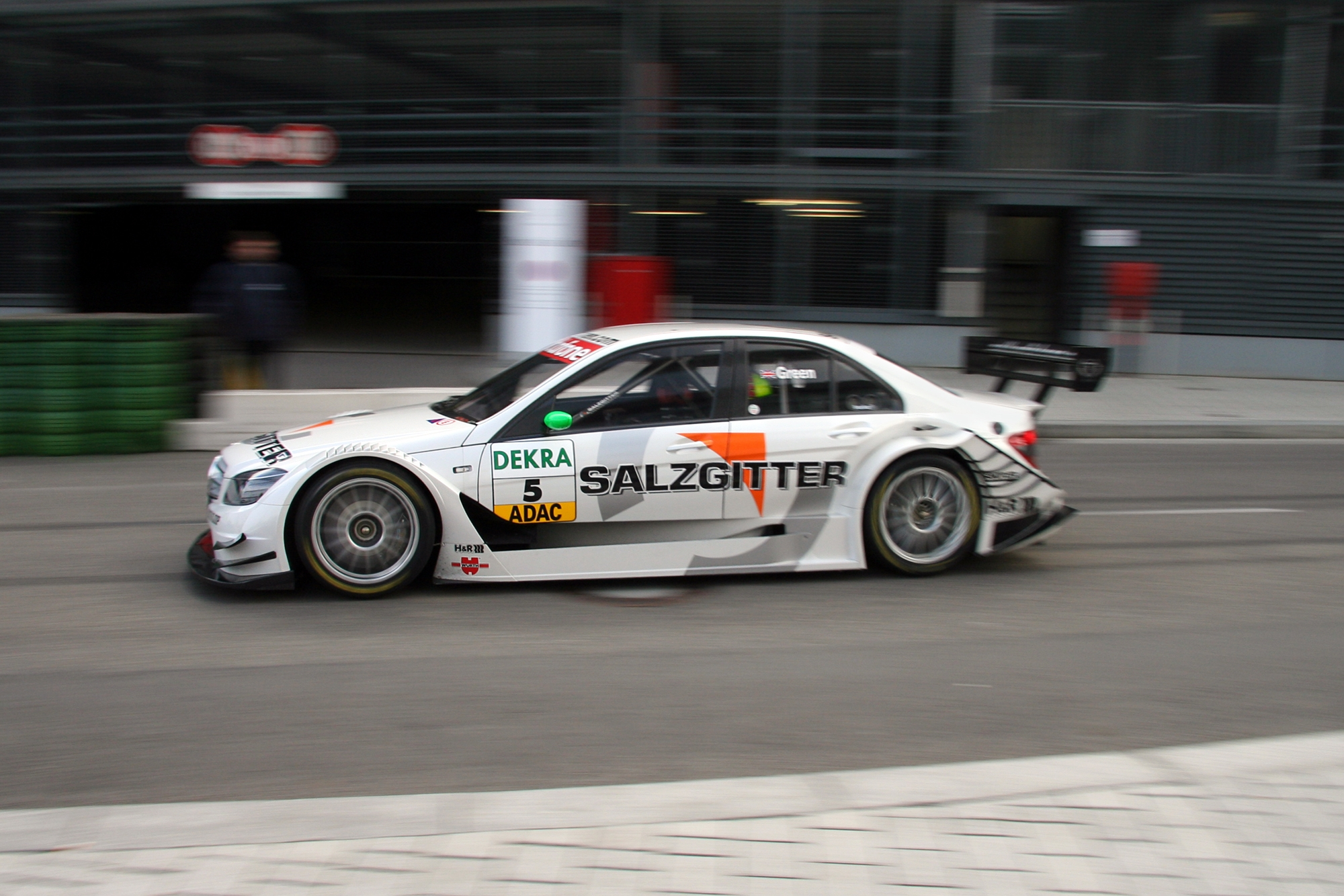 DTM car Mercedes-Benz AMG 2007 (C-Class, W204), Jamie Green (driver)